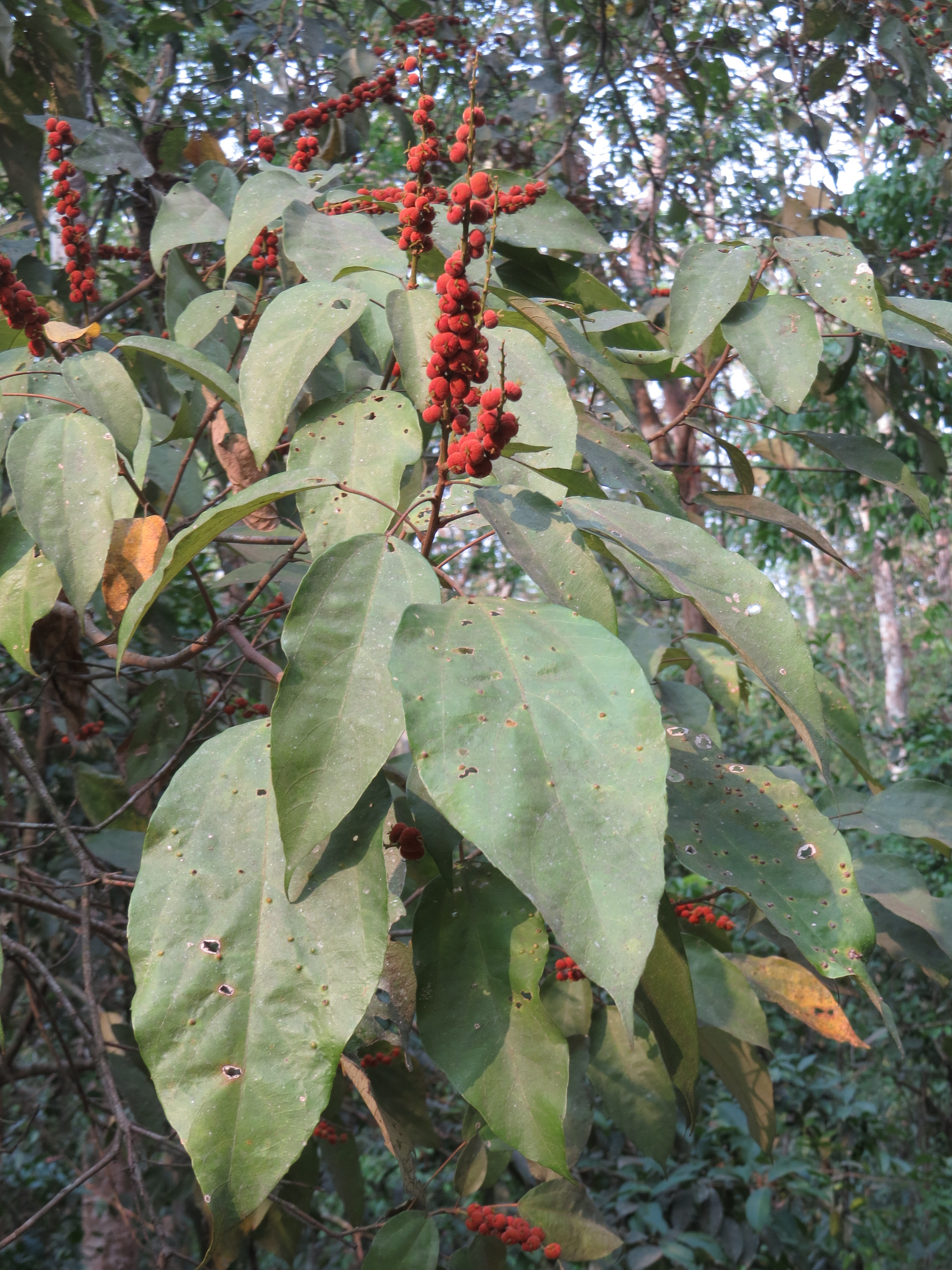 Photos from Peravoor